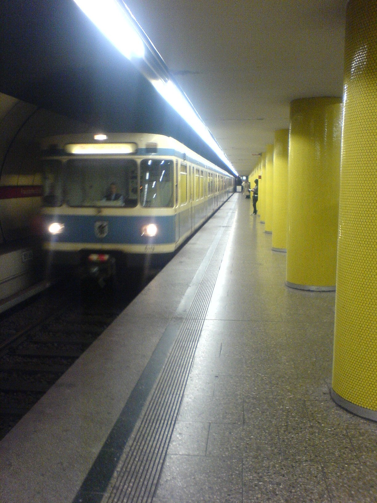 U-Bahn-Station Fraunhoferstraße, Bahnsteig (München)